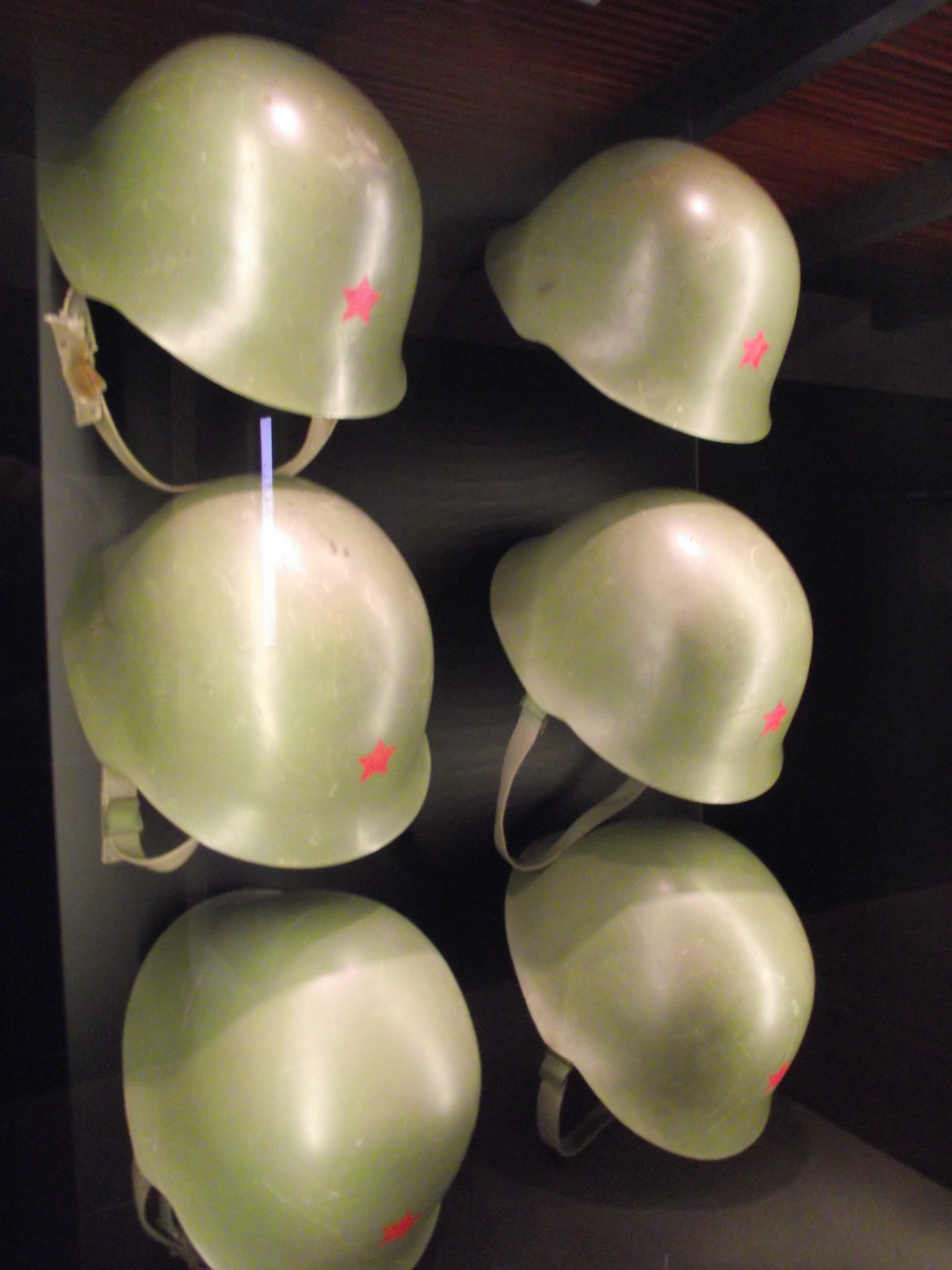 Ljubljana